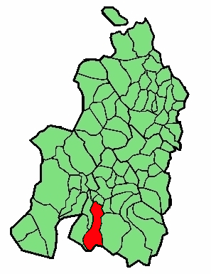 aipaturiko udalerriaren kokapena Nafarroa Beherean